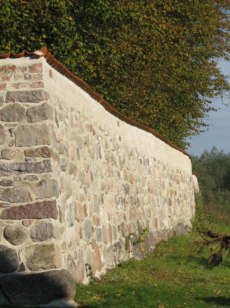 Grundhofer Friedhofsmauer (Süd-Ost-Ecke)